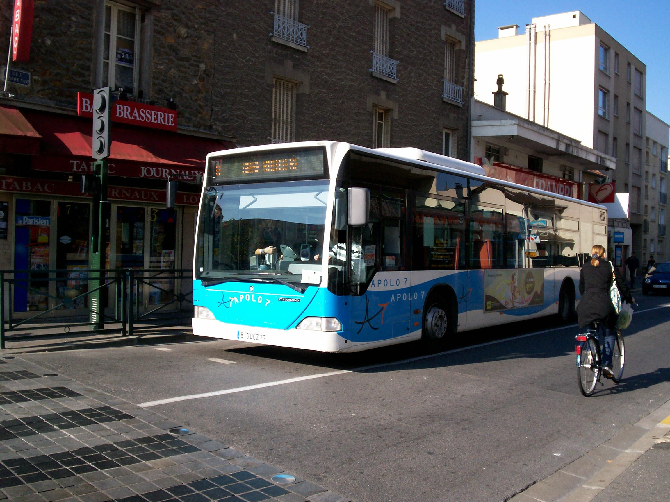 Citaro assurant la desserte de la Boucle des Abbesses à l'arrêt La Poste